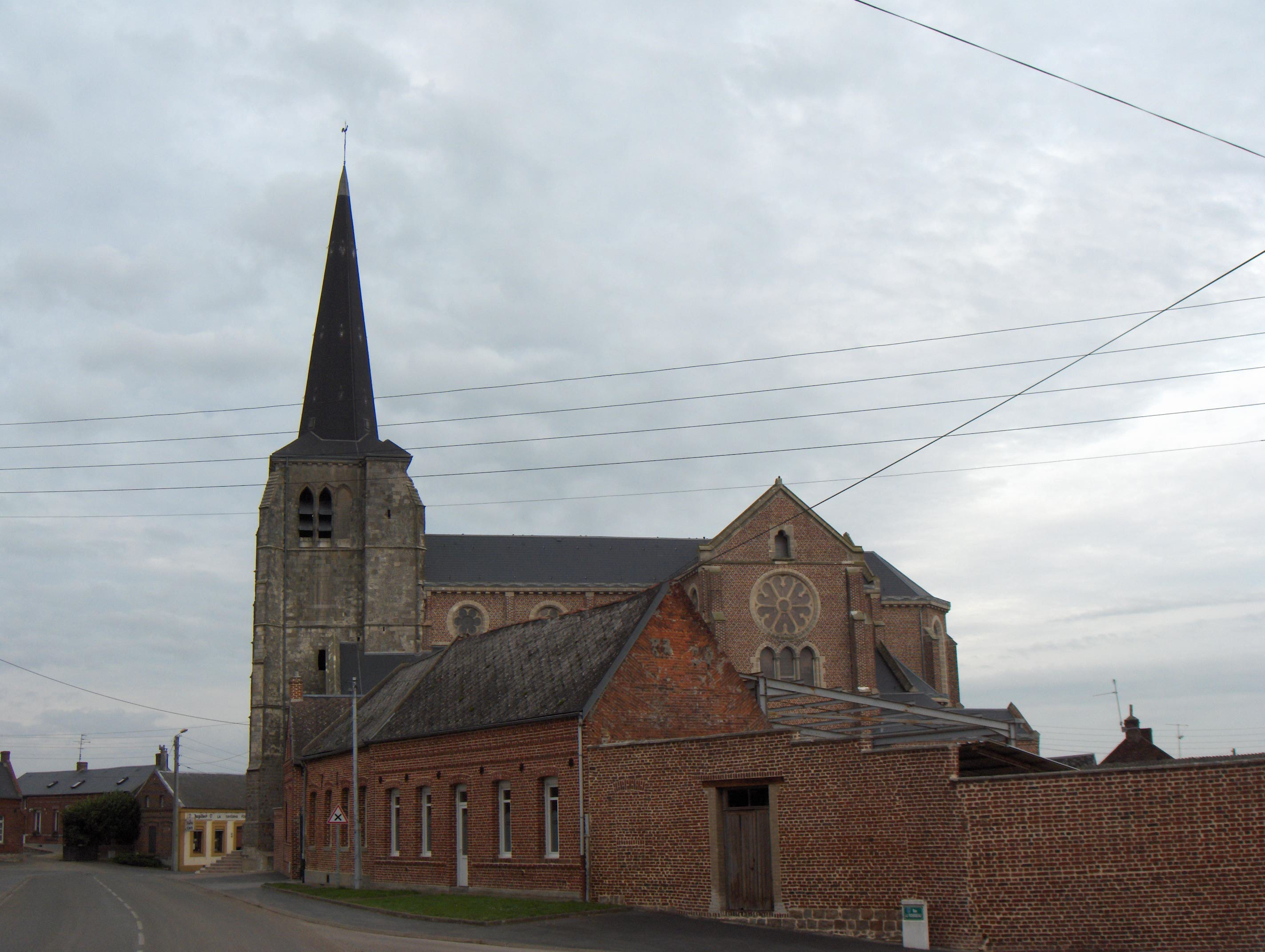 Fontaine-au-Pire, Frankreich (Dept. Nord), Kirche von Süden. Turm aus dem 16. Jh., neugotisches Schiff aus dem 19. Jh.